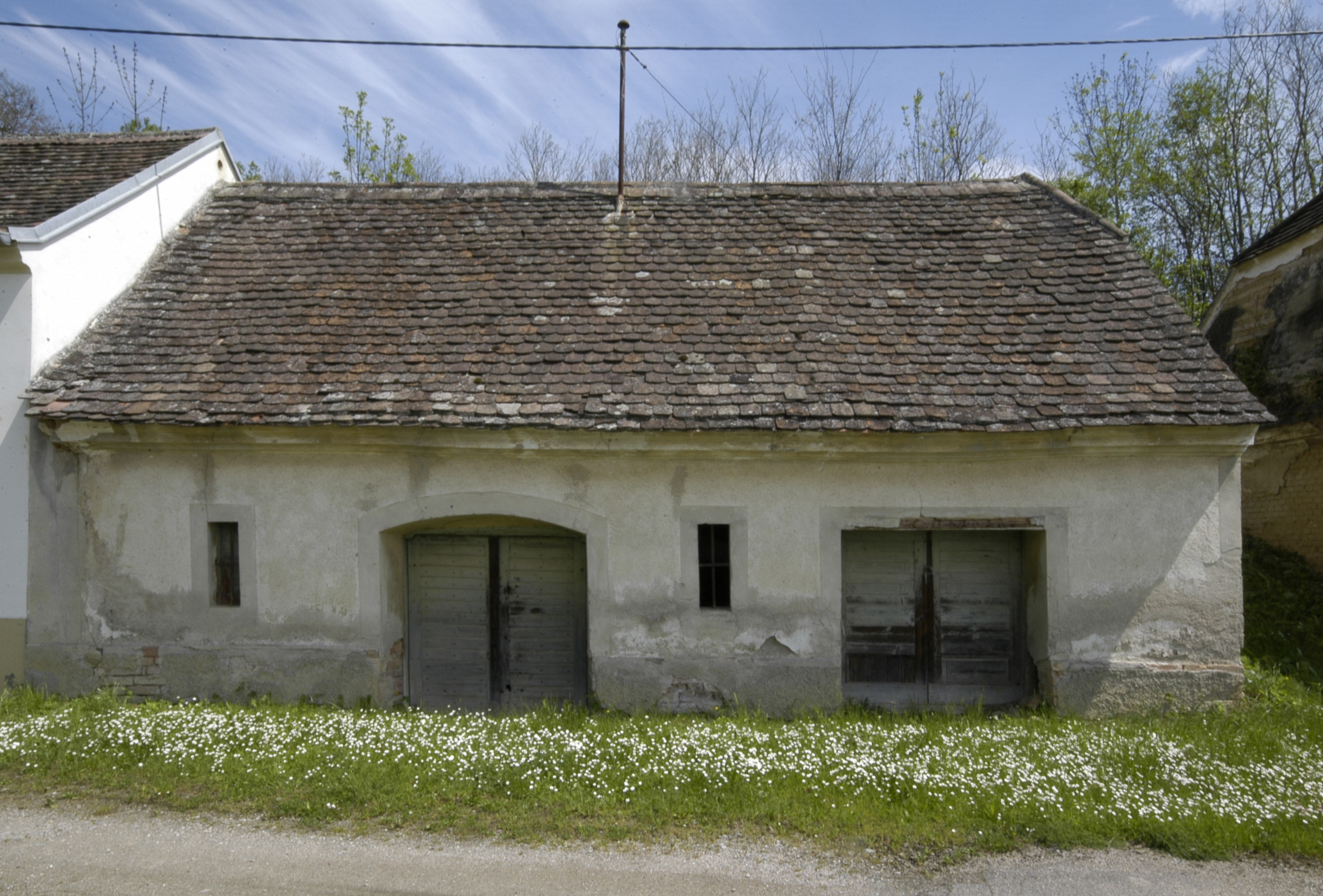 Objekt in der Mühlkellergasse in Frauendorf an der Schmida